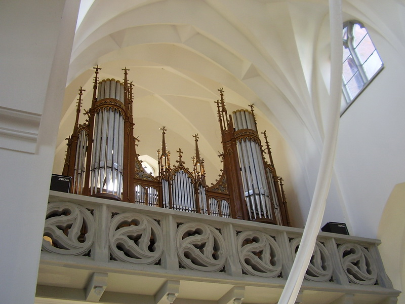 Мсцібава. Інтэр'ер касцёла